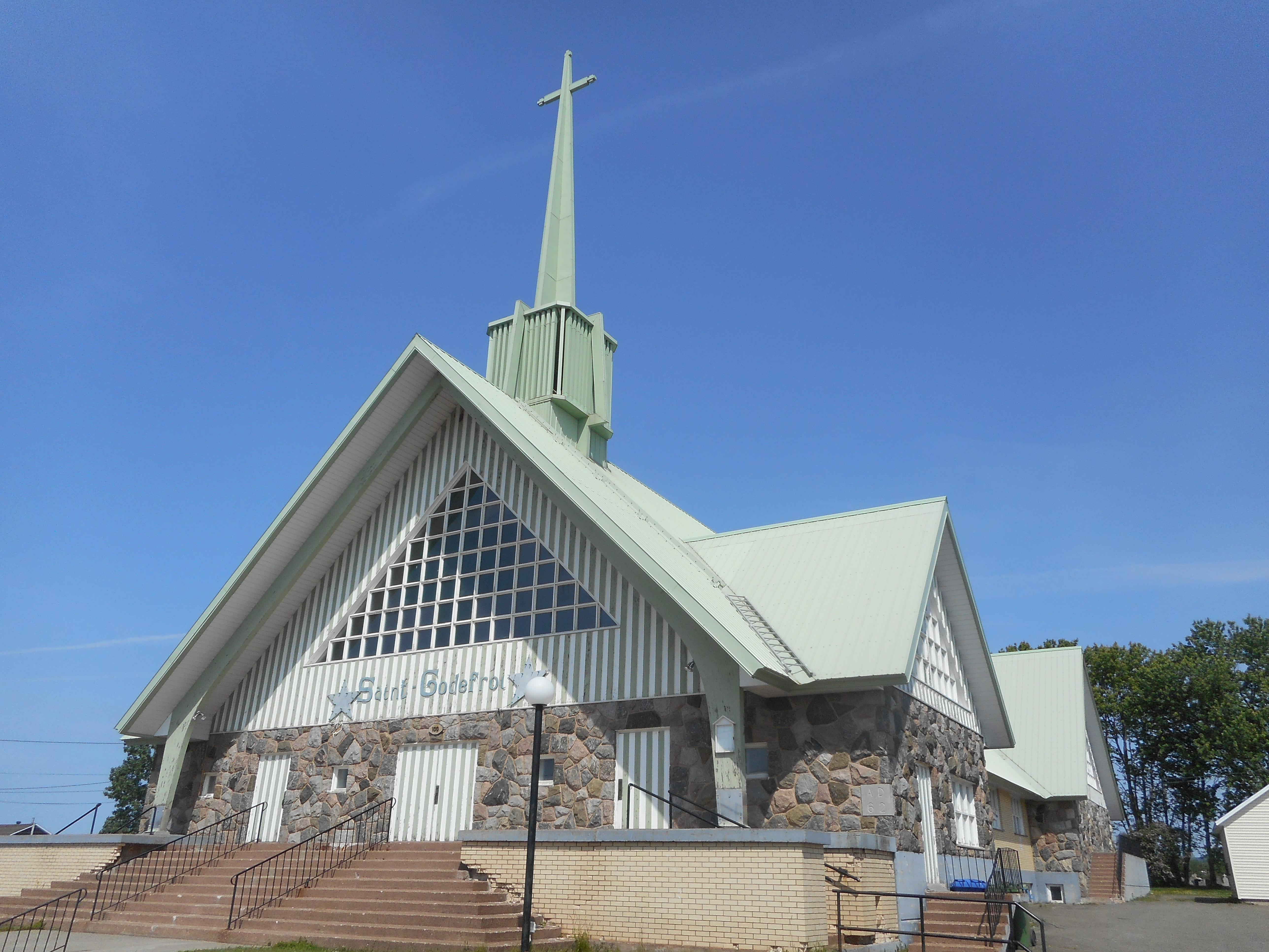 Église de Saint-Godefroi, route 132, Saint-Godefroi, Québec